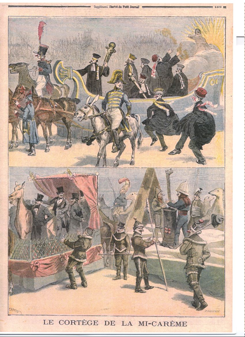 En haut, le char des facultés, en bas, à gauche, le char de l'Ecole d'Alfort, à droite, le char du Pôle Nord.